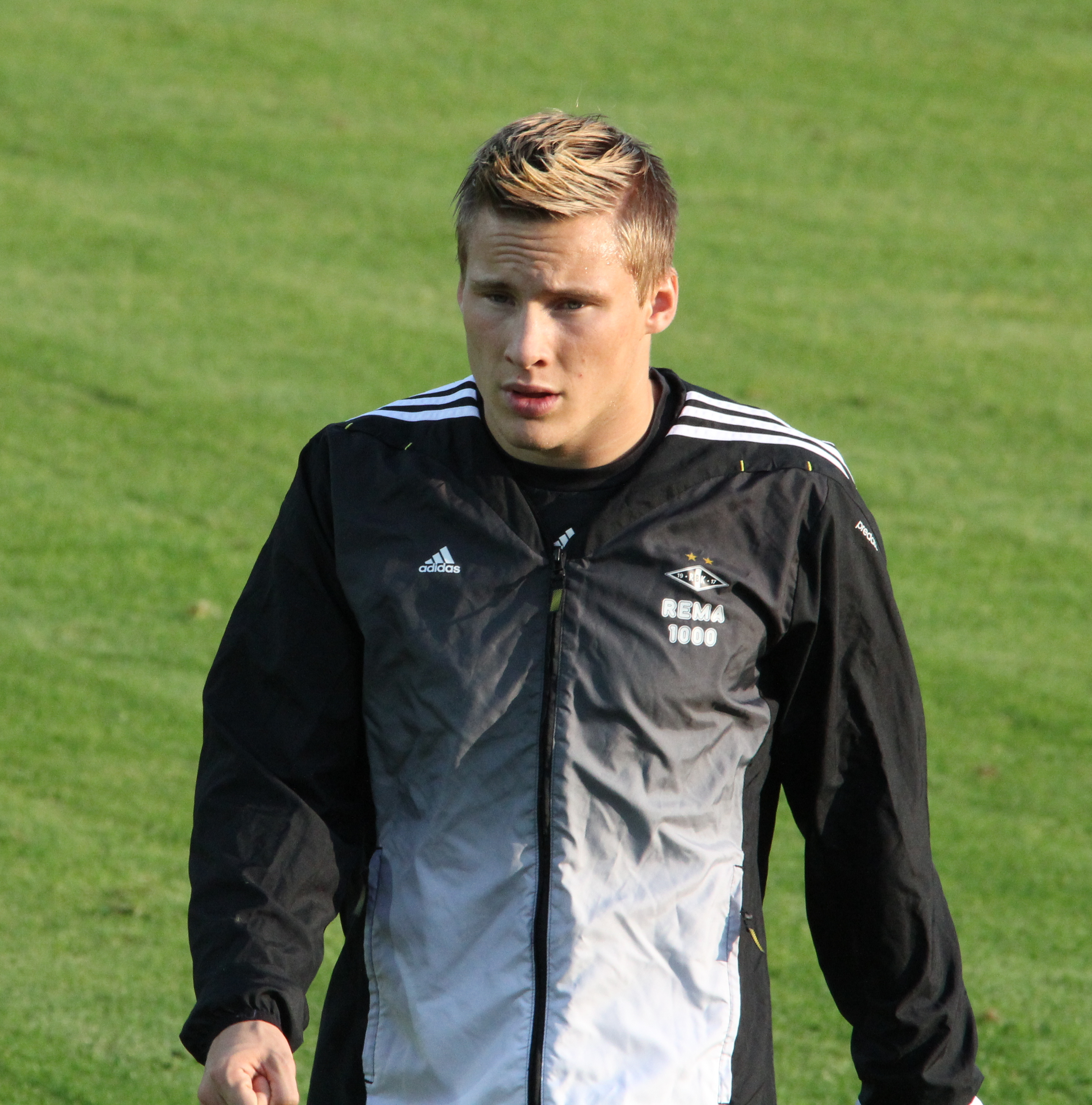 Jonas Svensson på Sandnes stadion 25. august 2013